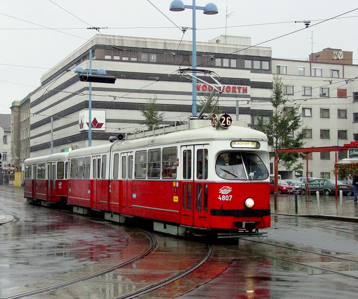 Zelfgefotografeerde media Categorie:Afbeelding tram